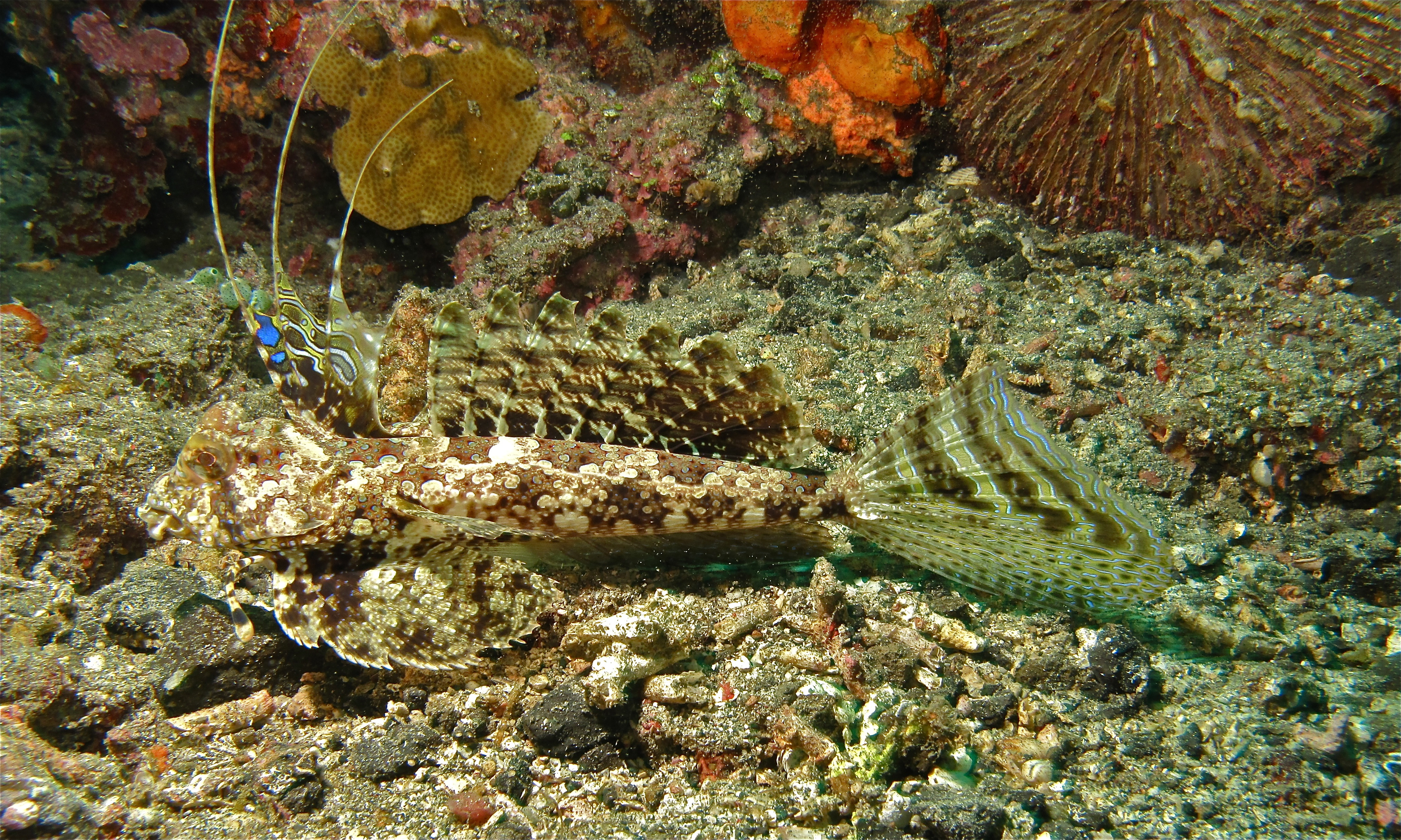 Makawide Island, Lembeh Strait, Sulawesi, INDONESIA